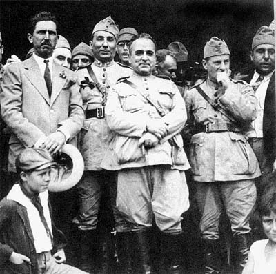 Лідери Бразильської революції 1930 року